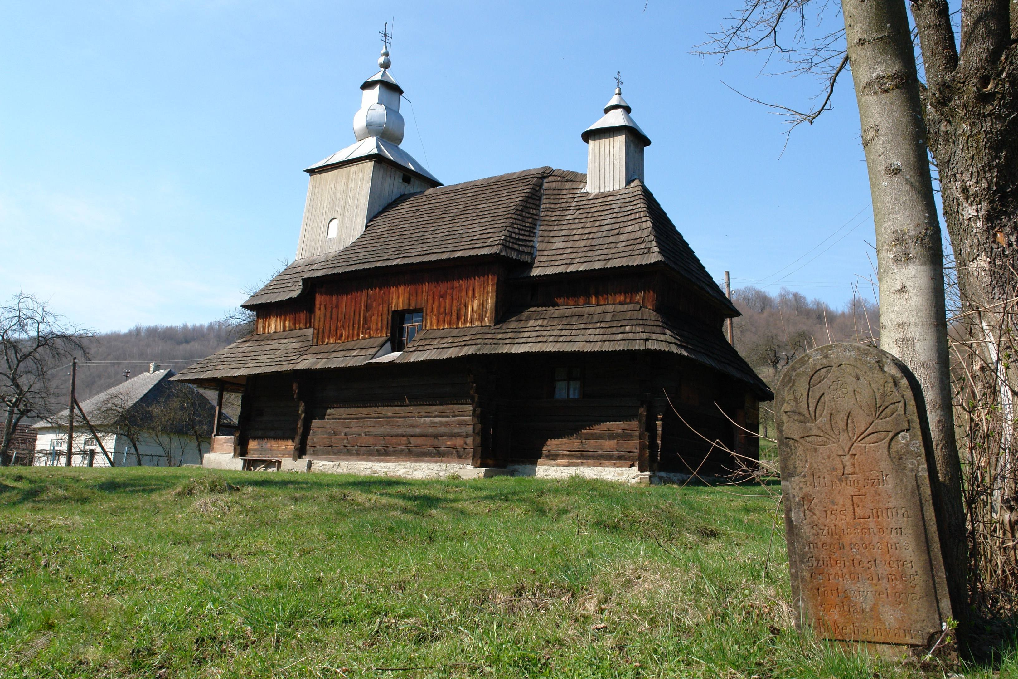 Sóslak fatemploma - KárpátaljaChurch of St. Basil, Sil.